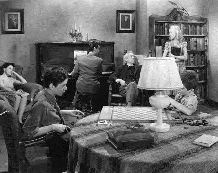 Image du film Le Père Chopin Une saine vie familiale